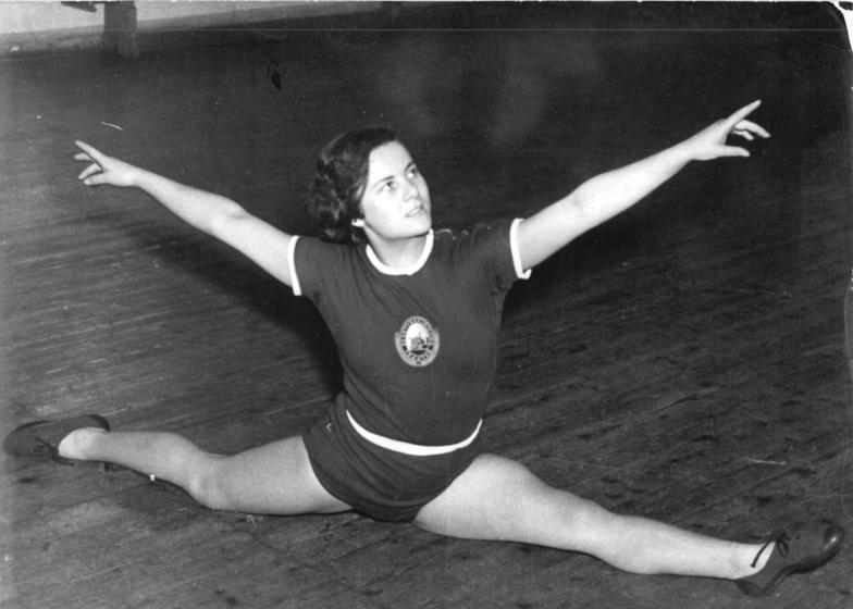 Zentralbild-Biscan, 21.1.1954 Landjugend treibt Sport. Die drei erfolgreichsten Sportwerbegruppen der Betriebssportgemeinschaft Traktor im Bezirk Magdeburg - die Sportwerbegruppen von Ottersleben, Kroppenstedt und Barssel - trafen sich in Magdeburg zur 1. Bezirks-Ausscheidung. Der Wettstreit, der einen guten Einblick in den Leistungsstand des Sports der Landjugend gewährte, endete mit einem knappen Sieg von Ottersleben vor Barssel und Kroppenstedt. UBz.: Die fünfzehnjährige Marion Kämpfer, die hier einen Spagat zeigt, ist die Beste der SV Traktor im Bodenturnen und im Pferdezeitspringen und ausserdem Bezirksmeisterin der SV Traktor im Fünfkampf